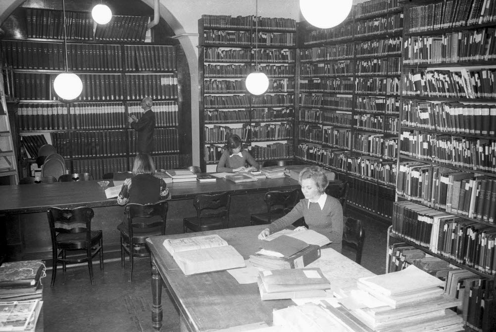 Lesesaal in Zimmer 515 im Rathausturm des Alten Rathauses. Am Regal im Hintergrund der Mitarbeiter Herr Pagel, vorn vermutlich die Sekretärin des Stadtarchivs.